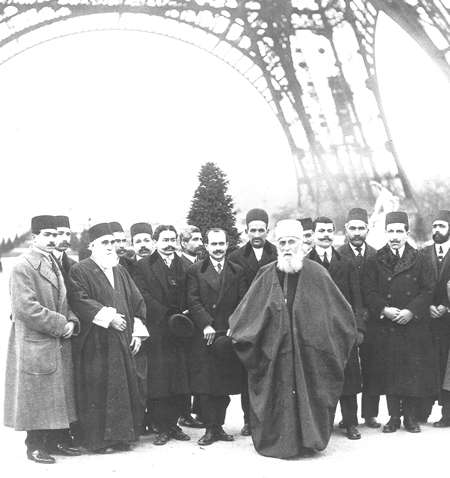 Abdul-Baha in Paris, France